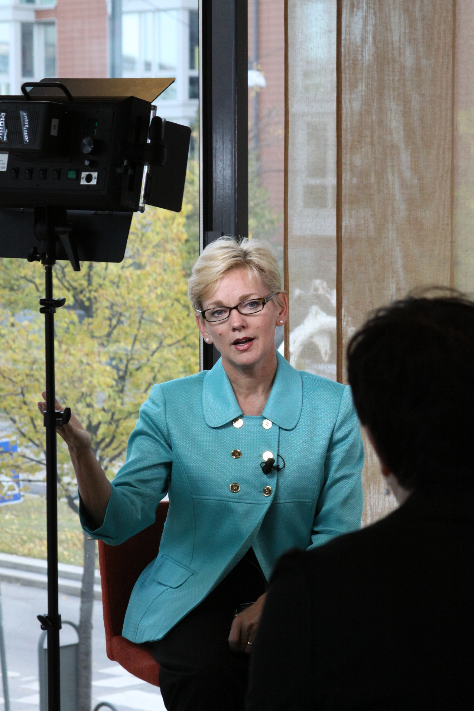 Jennifer Granholm